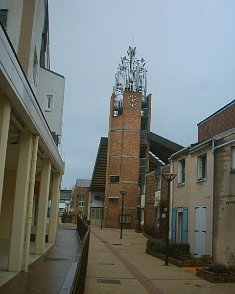 Maison de Quartier et Mairie Annexe, Jouy-le-Moutier on 03/03/06.